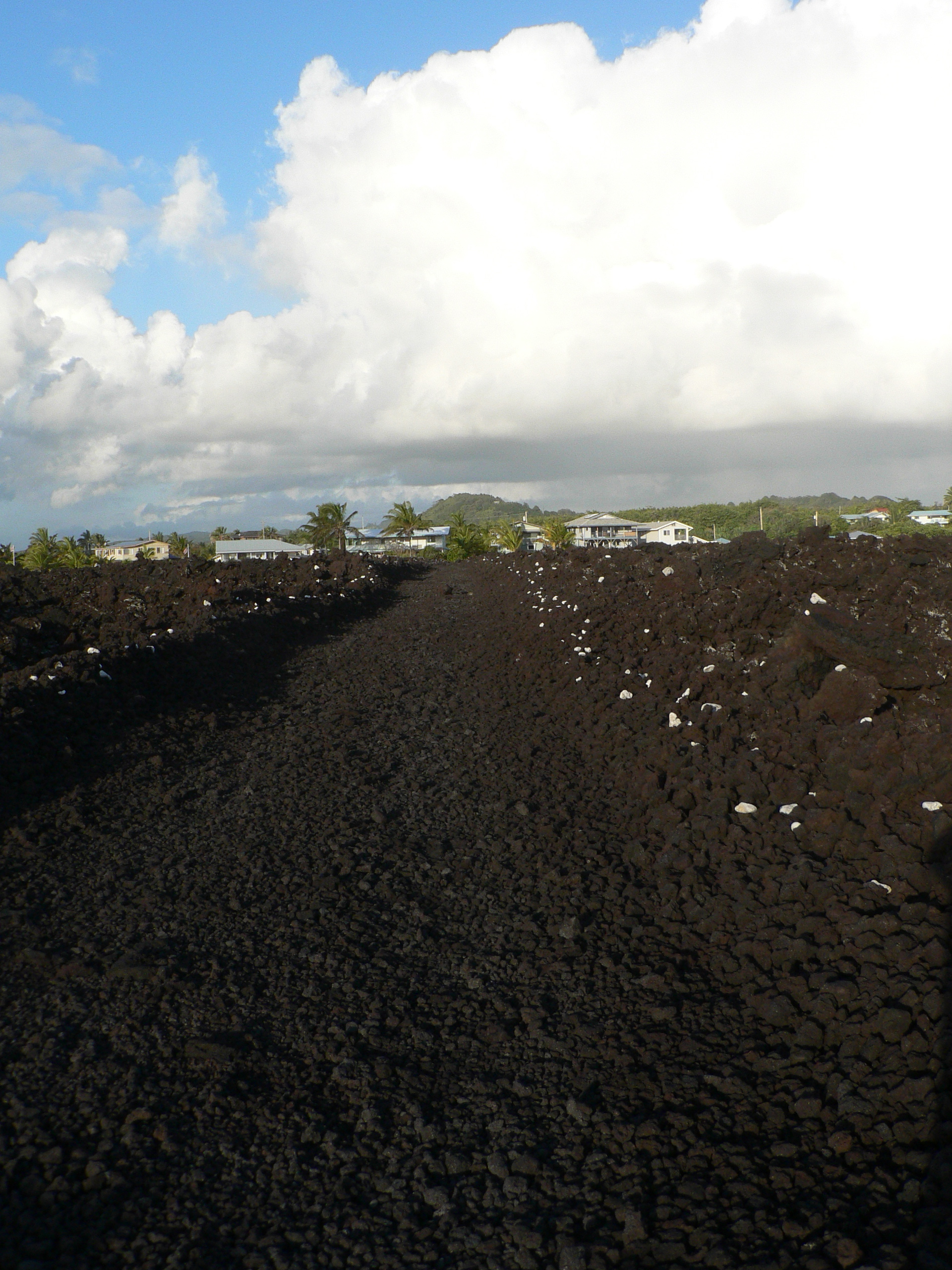 Kapoho Lava